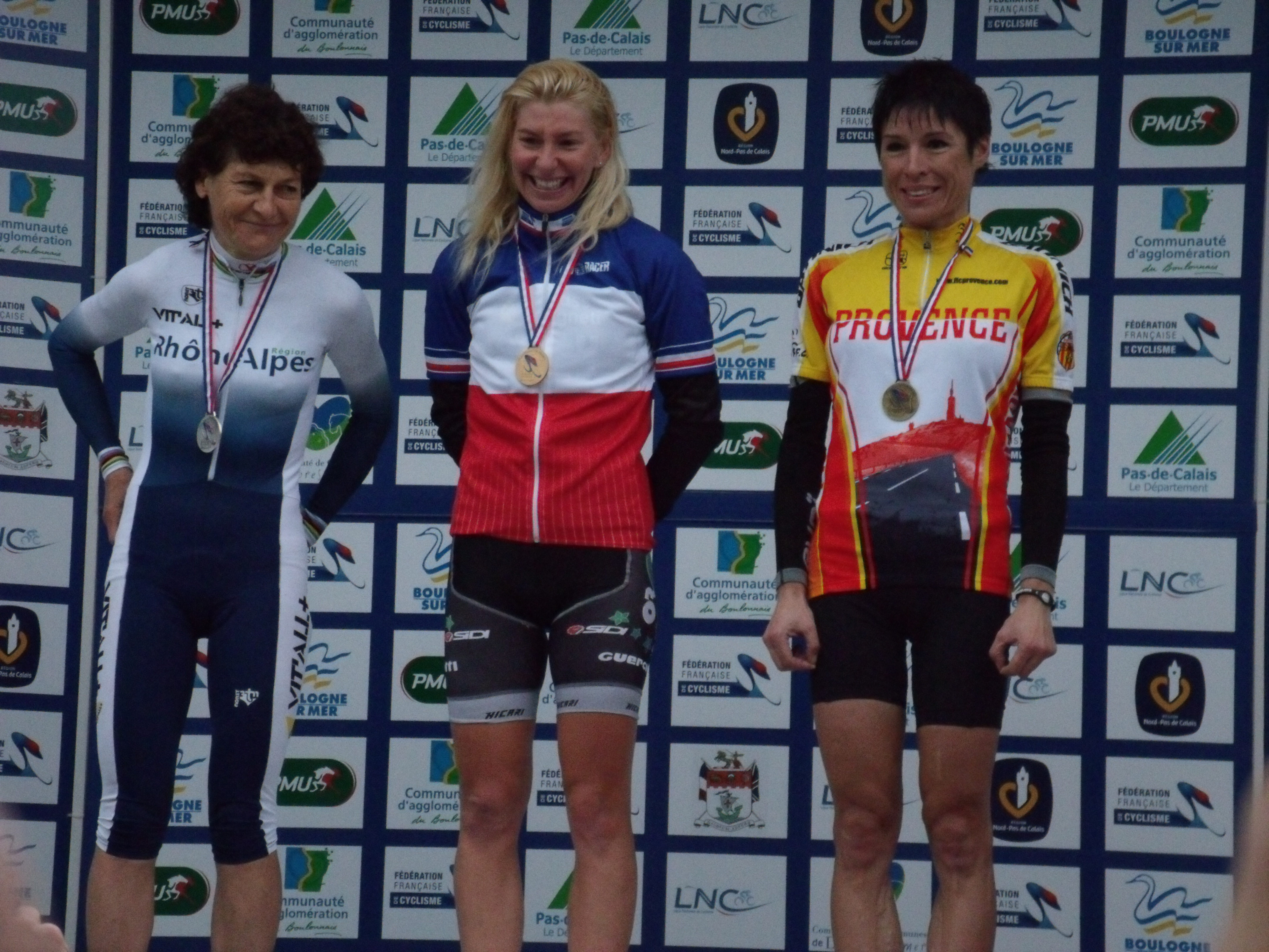 Jeannie Longo, Christel Ferrier-Bruneau et Magdalena de Saint-Jean sur le podium du championnat de France sur route 2011